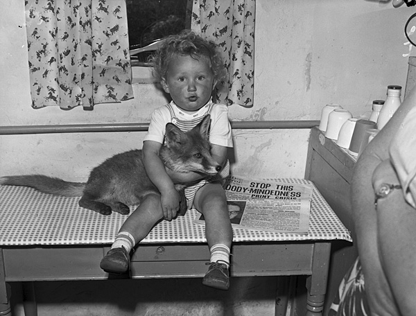 Teitl Cymraeg/Welsh title: Cadnawes ddof yng nghartre Mr a Mrs Gordon Jones, Talysarn. Ffotograffydd/Photographer: Geoff Charles (1909-2002) Nodyn/Note: Mr and Mrs Jones' son, Heddwyn, sitting on the kitchen table holding the cub. Dyddiad/Date: July 16, 1959 Cyfrwng/Medium: Negydd ffilm / Film negative Cyfeiriad/Reference: (gch20641) Rhif cofnod / Record no.: 3470327 Rhagor o wybodaeth am gasgliad Geoff Charles yn Llyfrgell Genedlaethol Cymru More information about the Geoff Charles Collection at the National Library of Wales